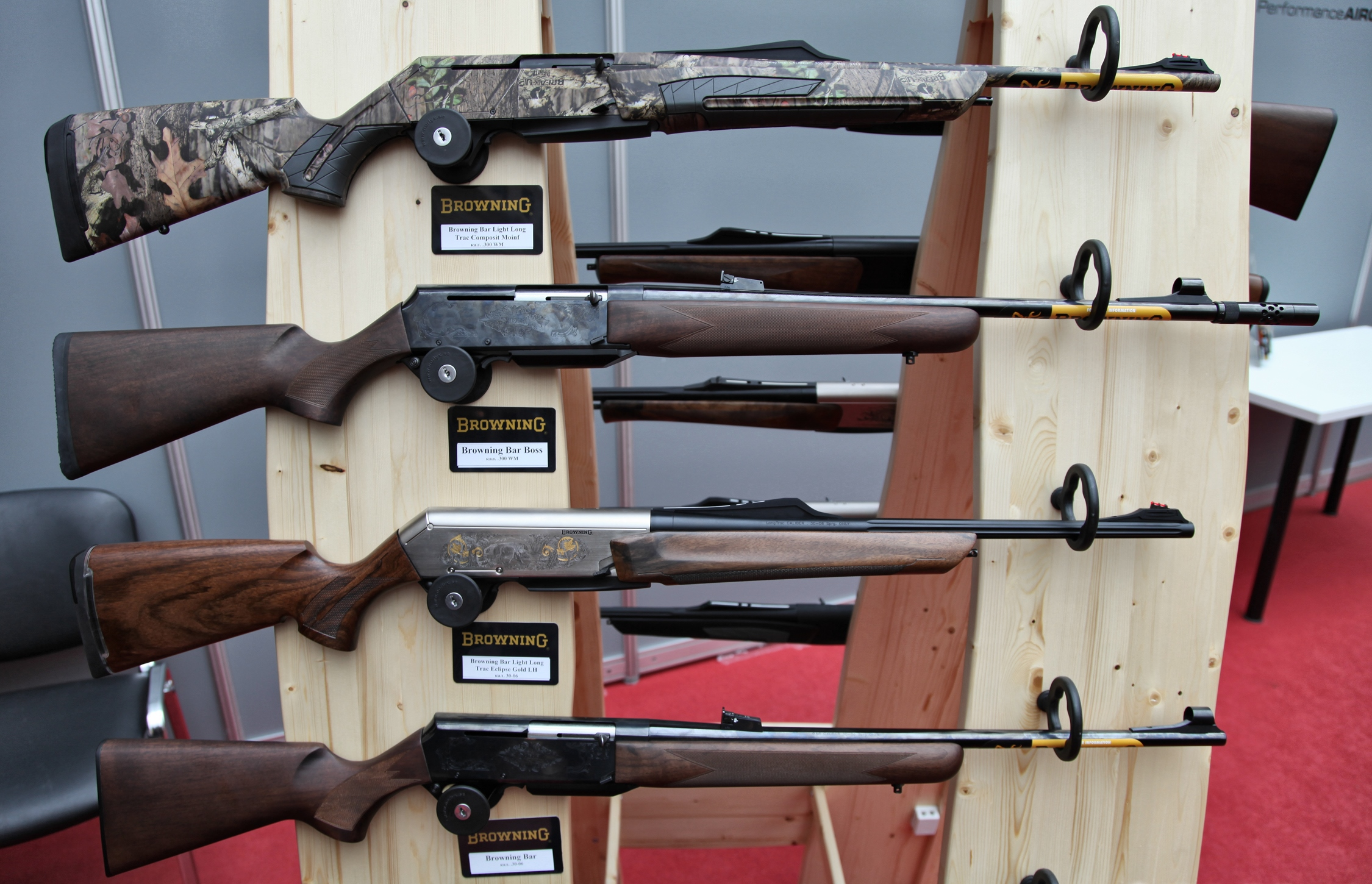 .300 WM ружья Browning BAR Light Long Trac Composite Moinf и Browning BAR Boss, а также .30-06 Browning BAR Light Long Trac Eclipse Gold LH